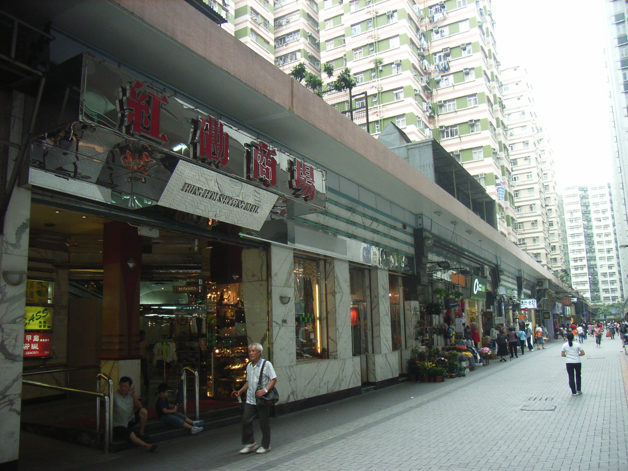 Hung Hom Shopping Mall, Hong Kong (User:Hung Yat).